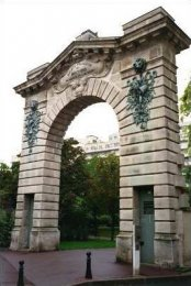 Portail Gévelot Issy les Moulineaux